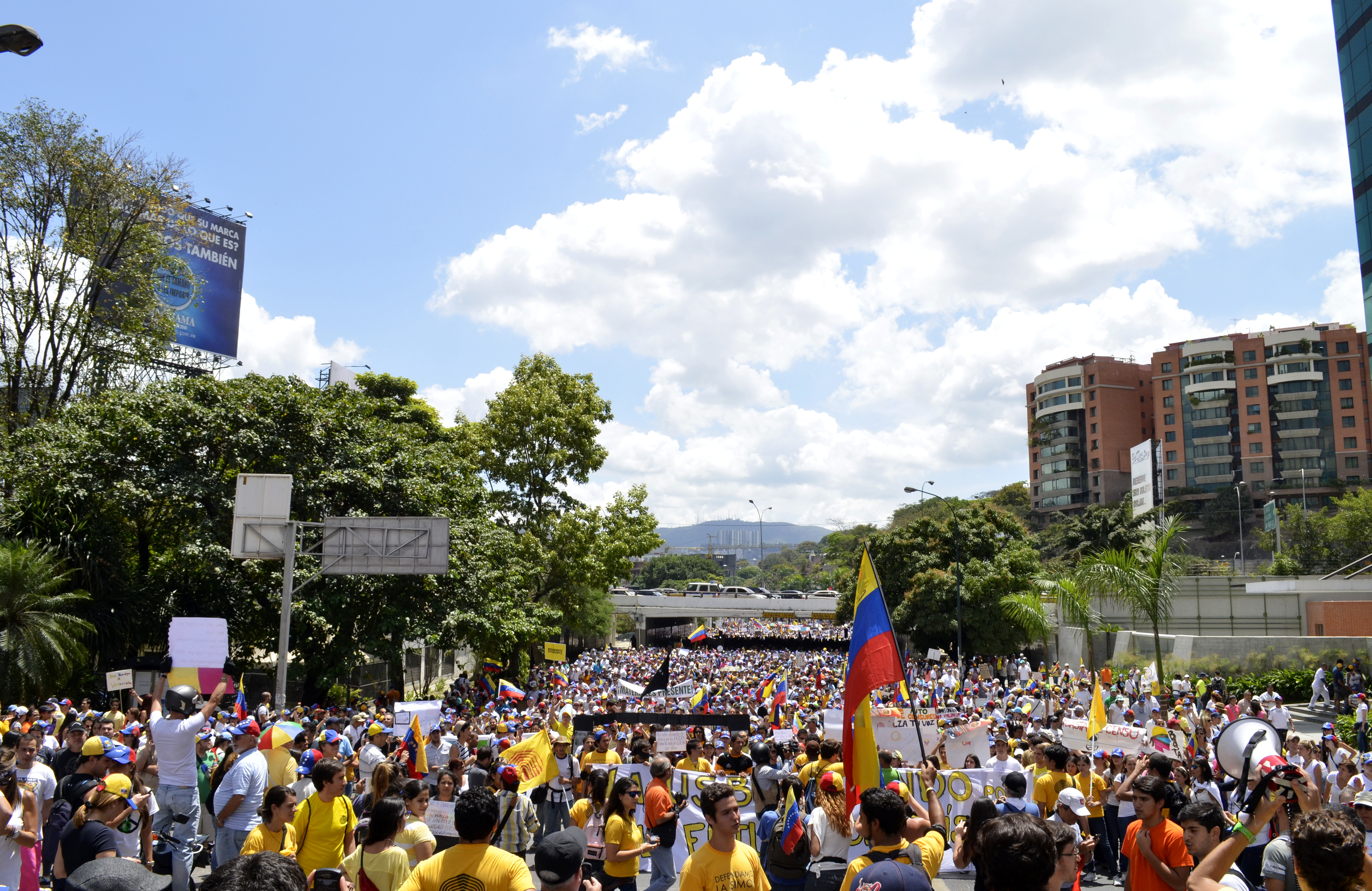 Protestas en Caracas, 02Mar14